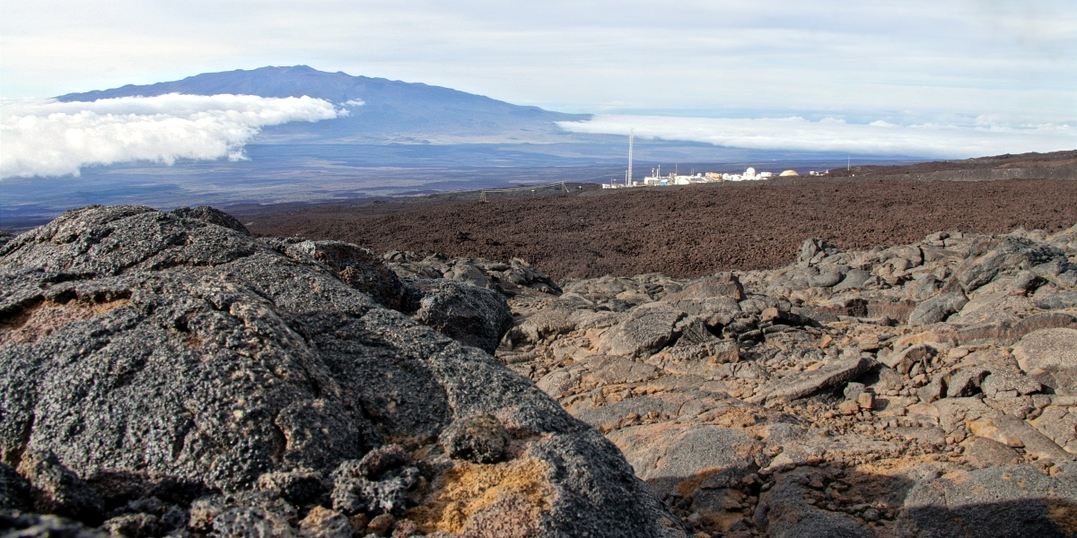 Иллюстрация для викиучебника Гавайеведение